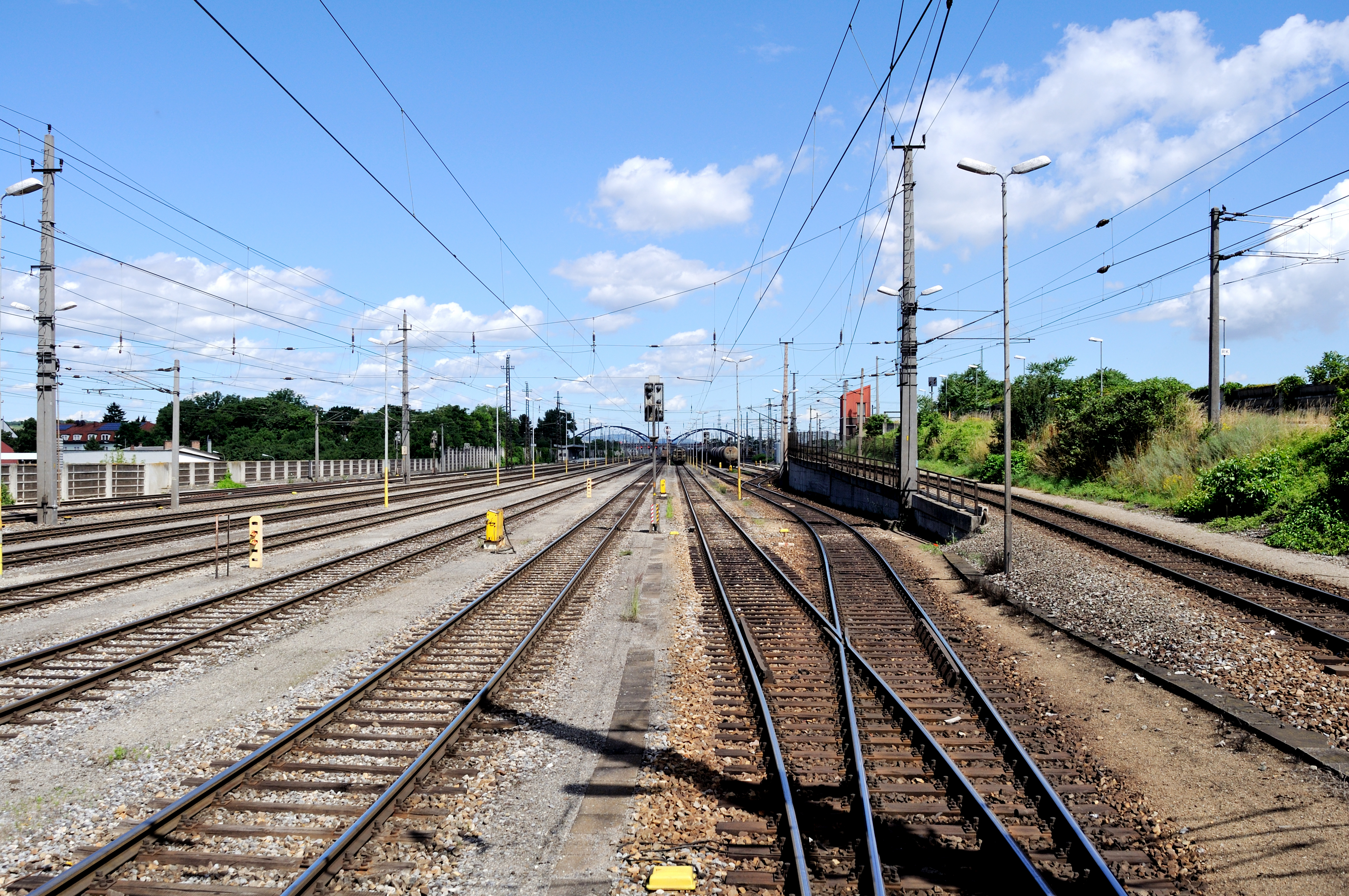 Ausfahrgruppe am Wiener Zentralverschiebebahnhof Kledering.